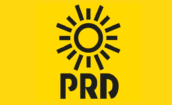 pnh